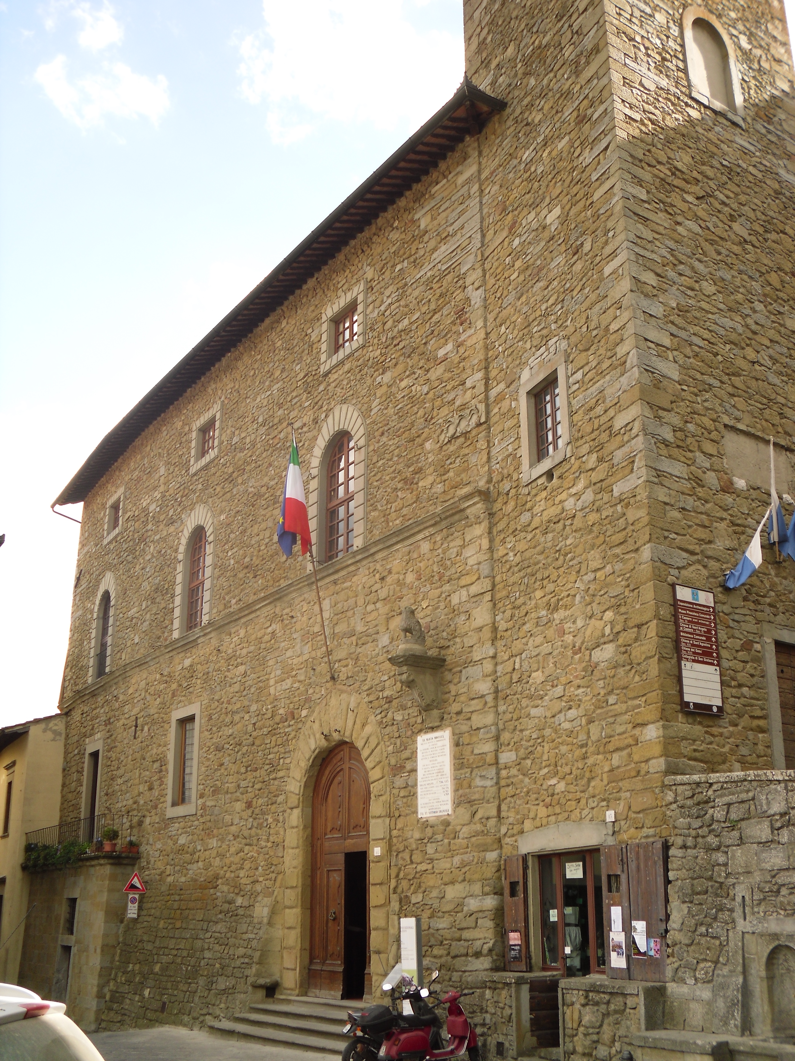 Municipio, Castiglion Fiorentino, Arezzo, Italia